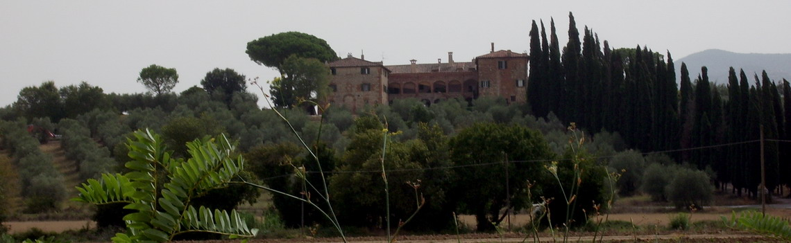 Panorama di Monte Lattaia Roccastrada